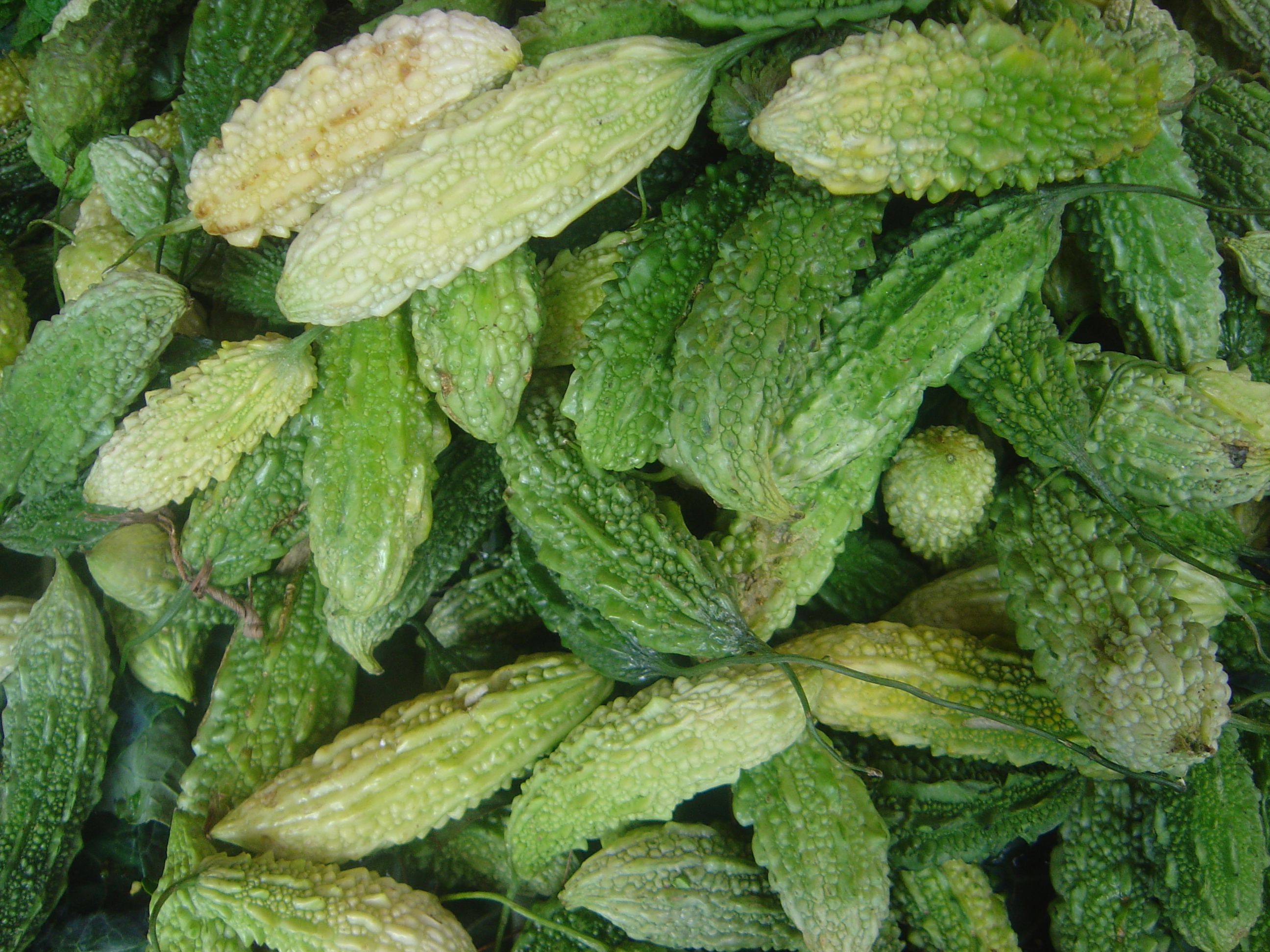 Momordica charantia on sale in Réunion Island